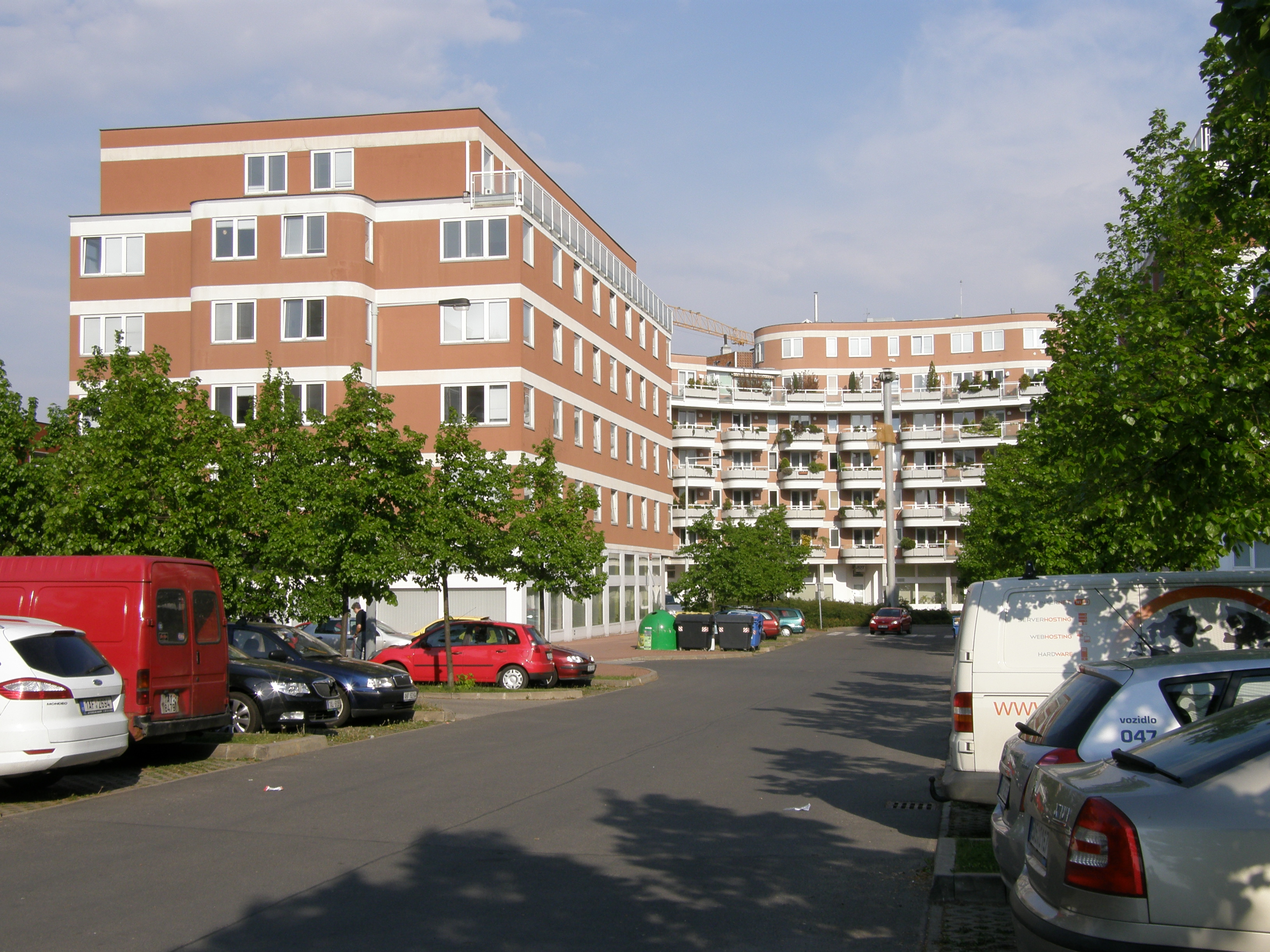 Praha-Jinonice, Fakulta humanitních studií UK